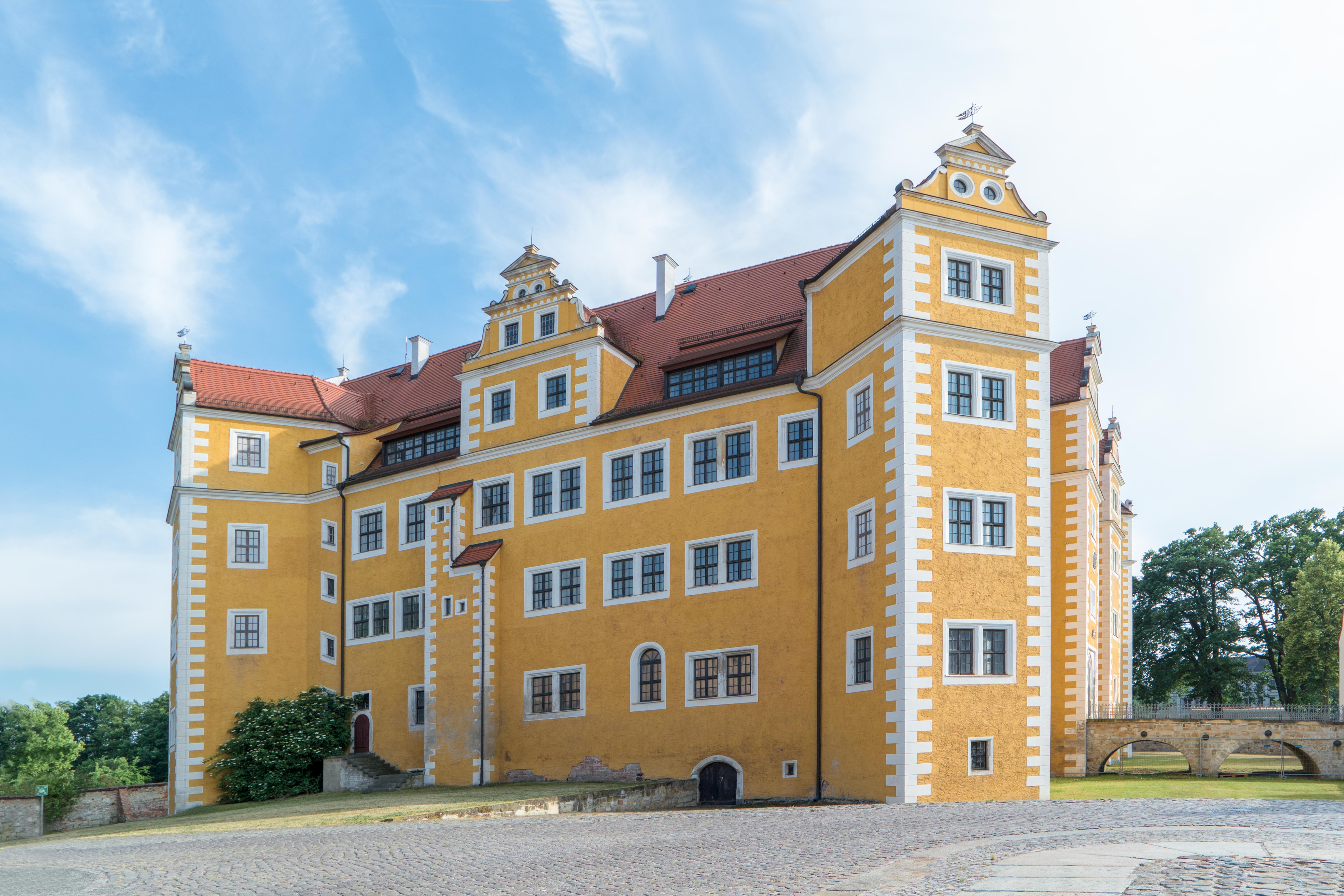 Schloss Annaburg, das Hinterschloss